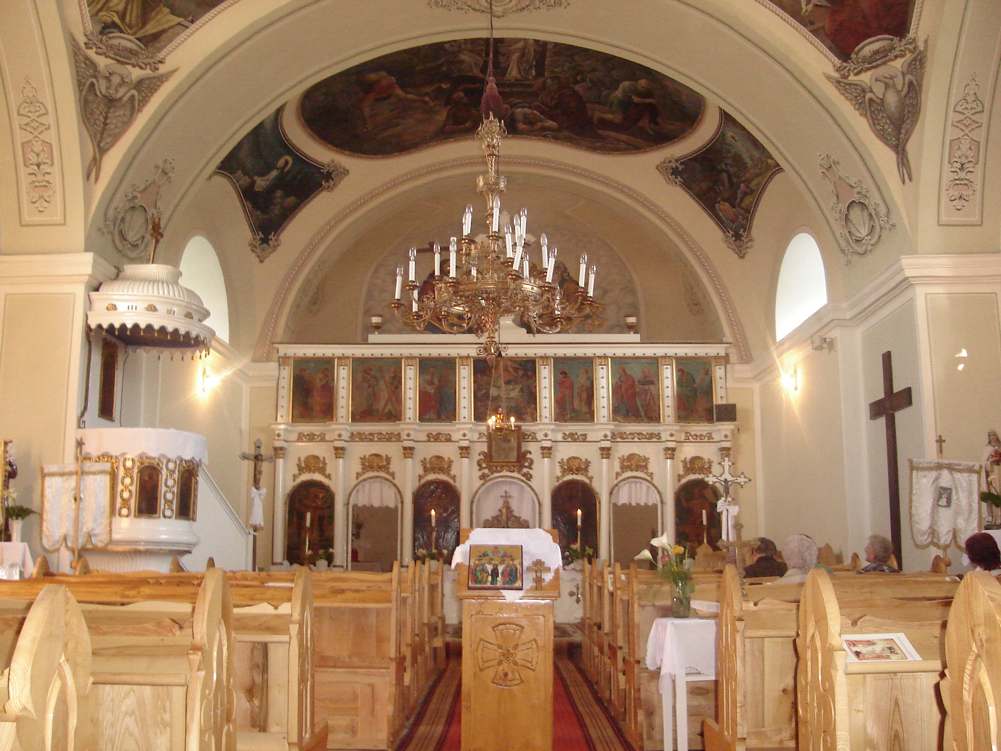 A tiszaújlaki görög katolikus templom ikonosztáza szemből